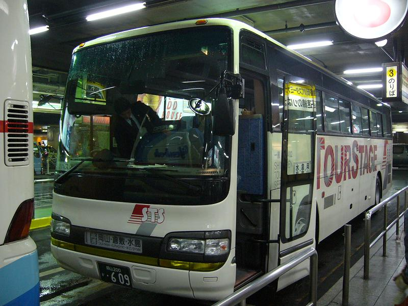 登録番号 岡山200か・609 シモデンツアーサービス所属 大阪梅田エクスプレス号用 2007年3月25日 阪急三番街にて撮影